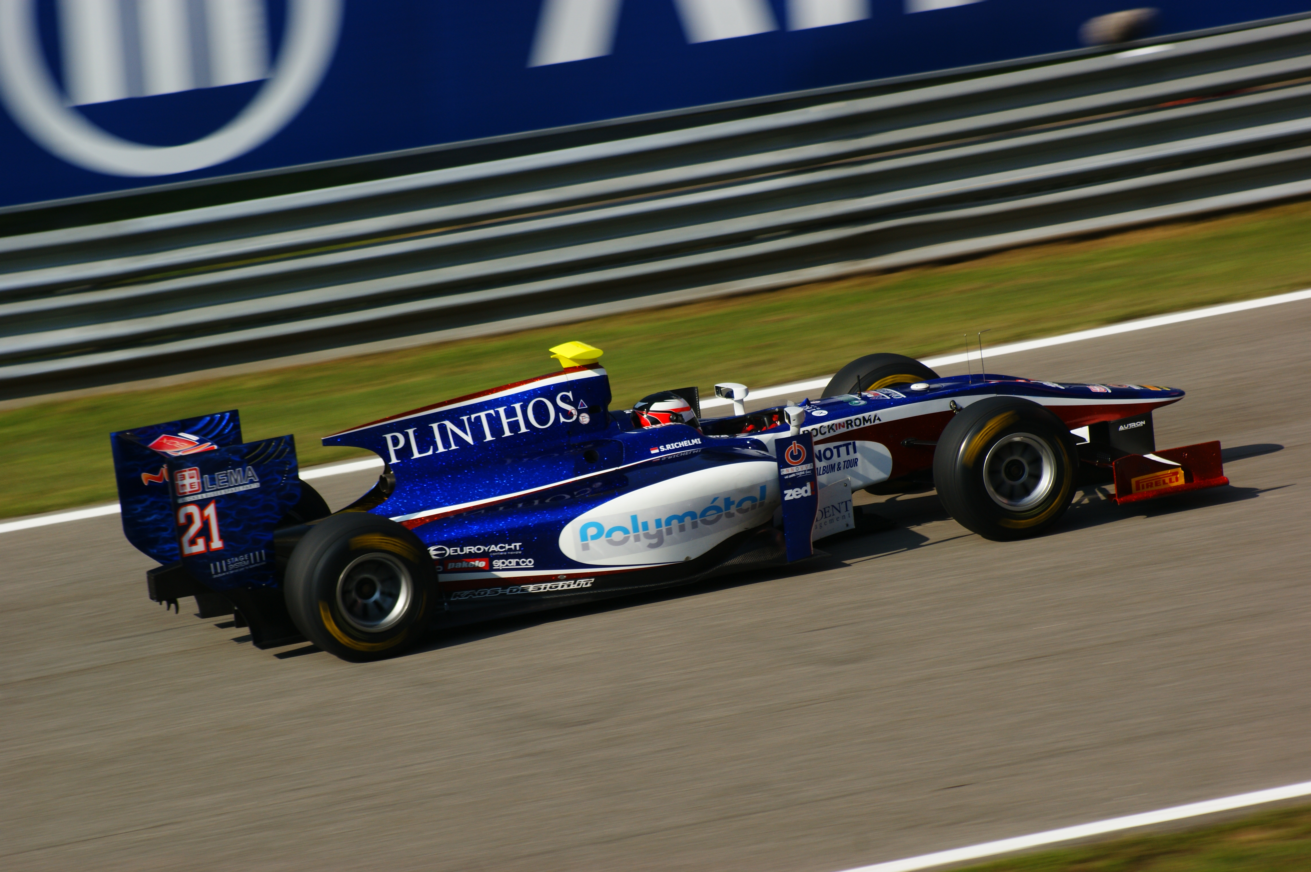 Stéphane Richelmi alla variante della roggia Monza 2011